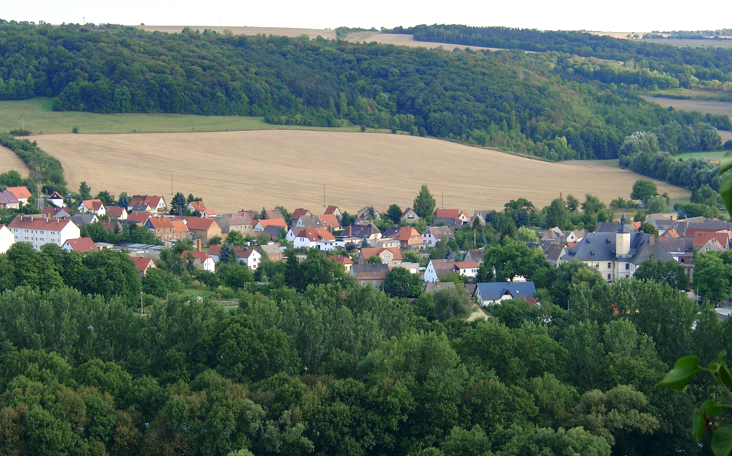 Blick von der Klosterruine Zscheiplitz auf Balgstädt